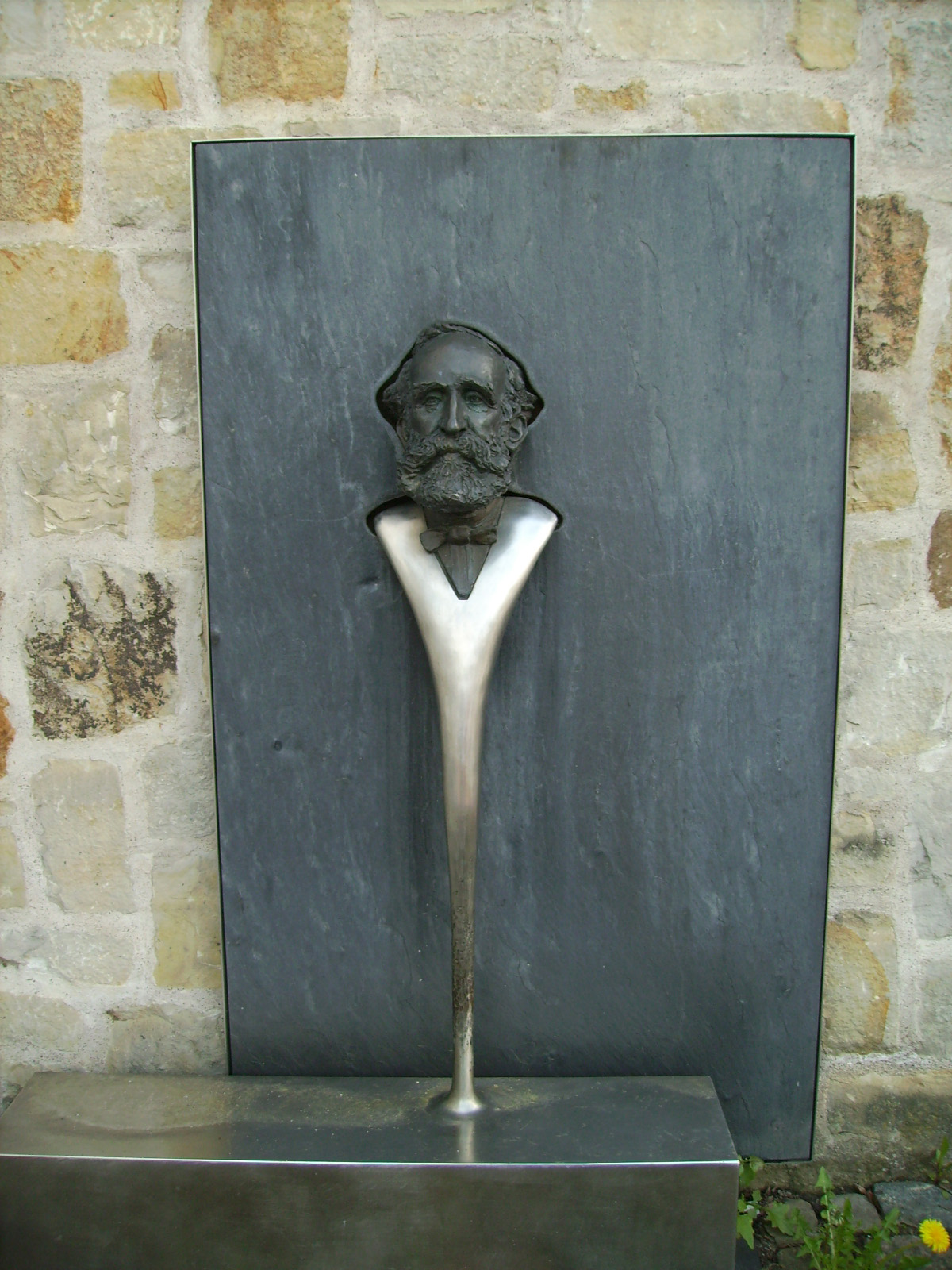 Göbel-Denkmal von 1993 in Springe am Amtsgericht. Der Künstler sieht in Göbel den zeugenden Vater und in Edison die Mutter der Glühlampe, wobei der den Kopf einfassende Edelstahl vor dem schwarzen Schiefer als Samenfaden die Lichtzeugung aus dem Kopf Göbels darstellen soll.